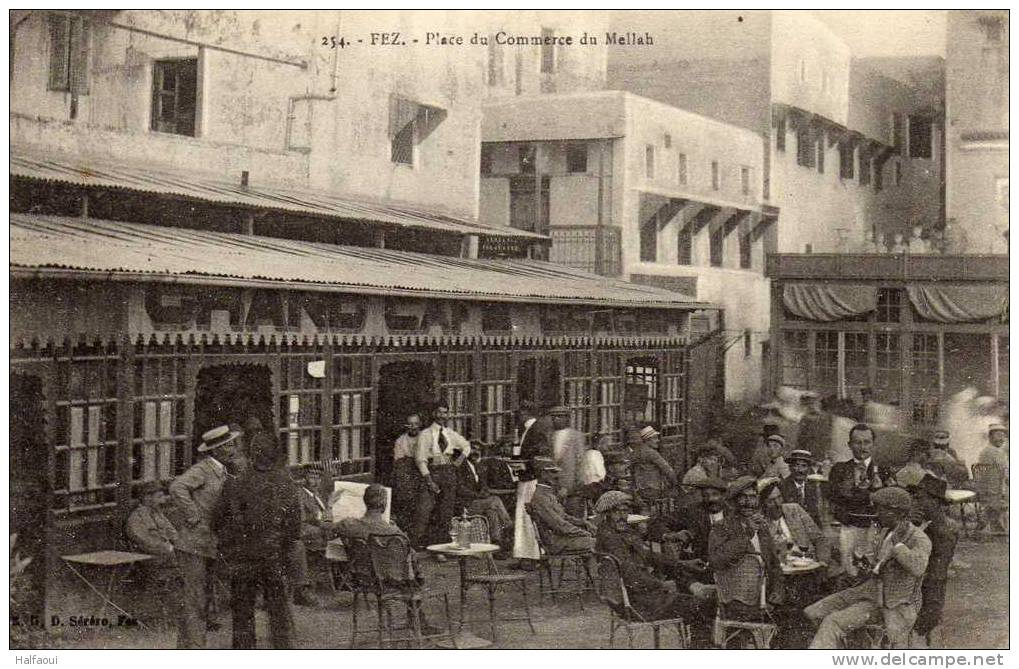 בית קפה יהודי בפאס, 1912.